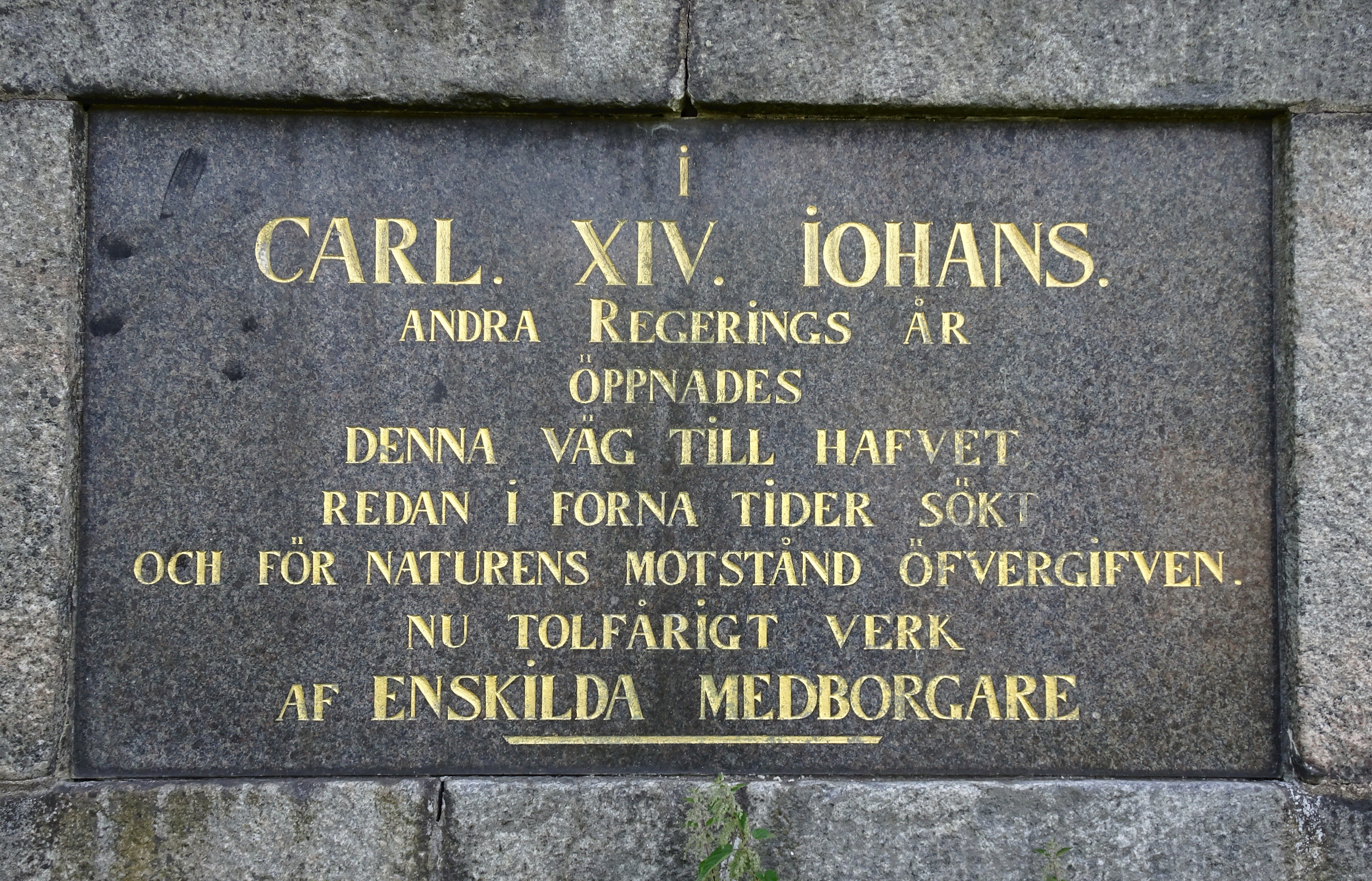 Södertälje gamla slussen, minnestavla